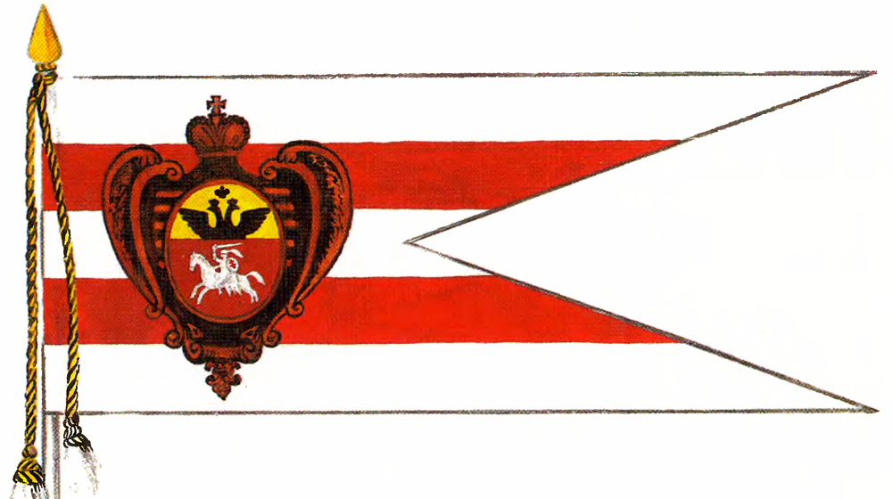 Беларуская (тарашкевіца): Ротны сьцяг Беларускай гусарскай харугвы з Пагоняй (Pahonia) на бел-чырвона-белым фоне